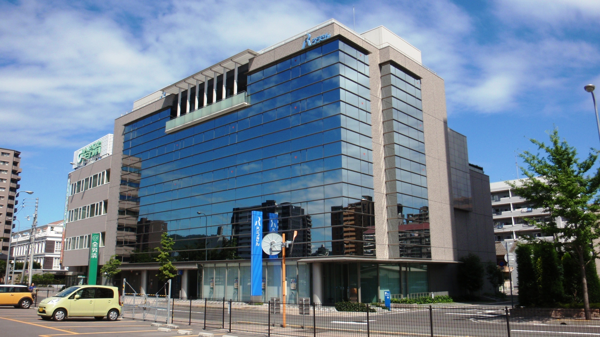 香川県高松市浜ノ町にある四国労働金庫本店。